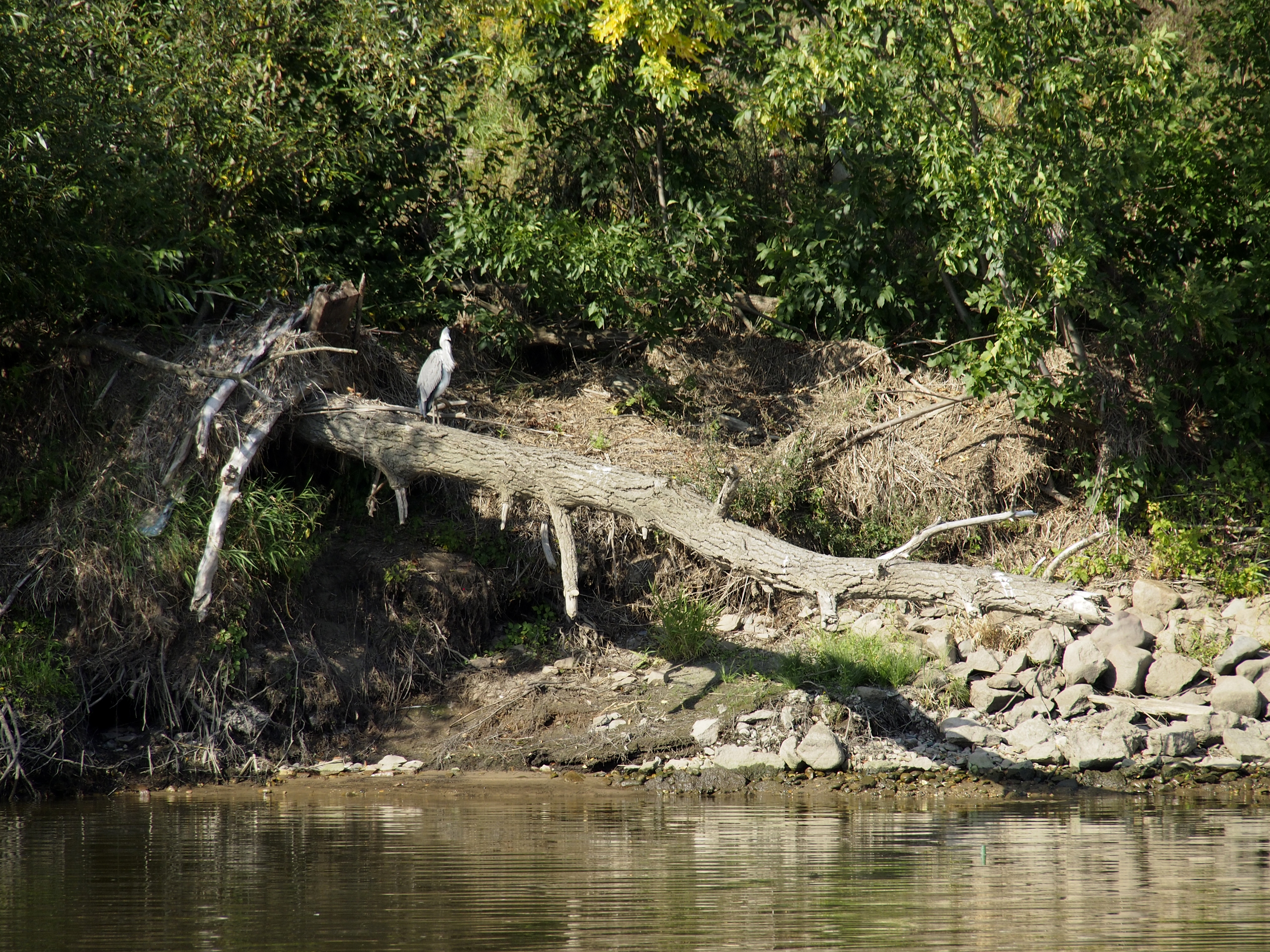 Gauernitzer Elbinsel - Graureiher auf einem umgestürzten Baumstamm